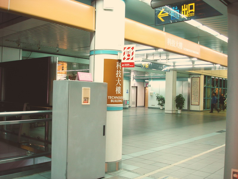 臺北捷運文山線科技大樓站。